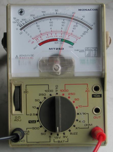 Analogmultimeter